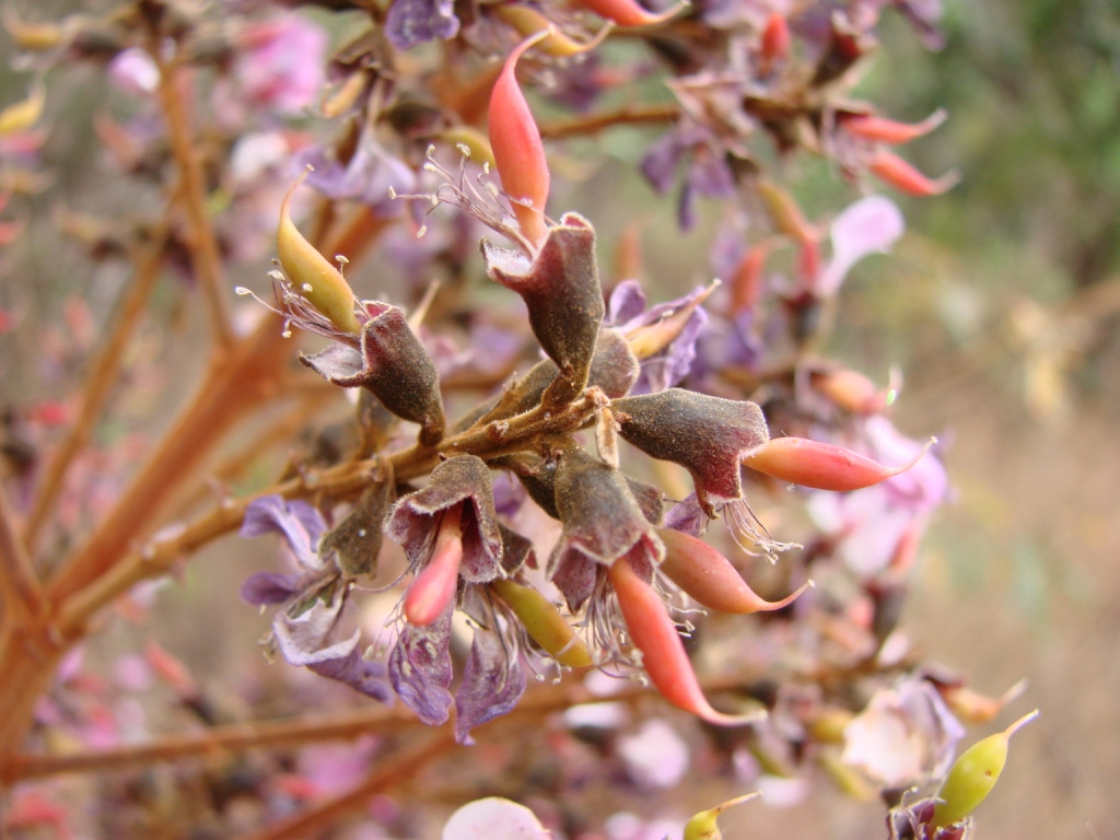 Andira vermifuga (Mart.)Benth. - FABACEAE Jardim Botânico de Brasília - Distrito Federal - Brasil.